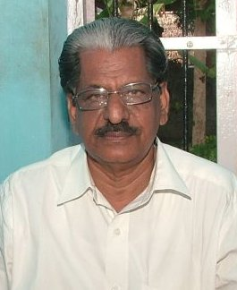 എ.എ.അസീസ് .എം.എൽ.എ